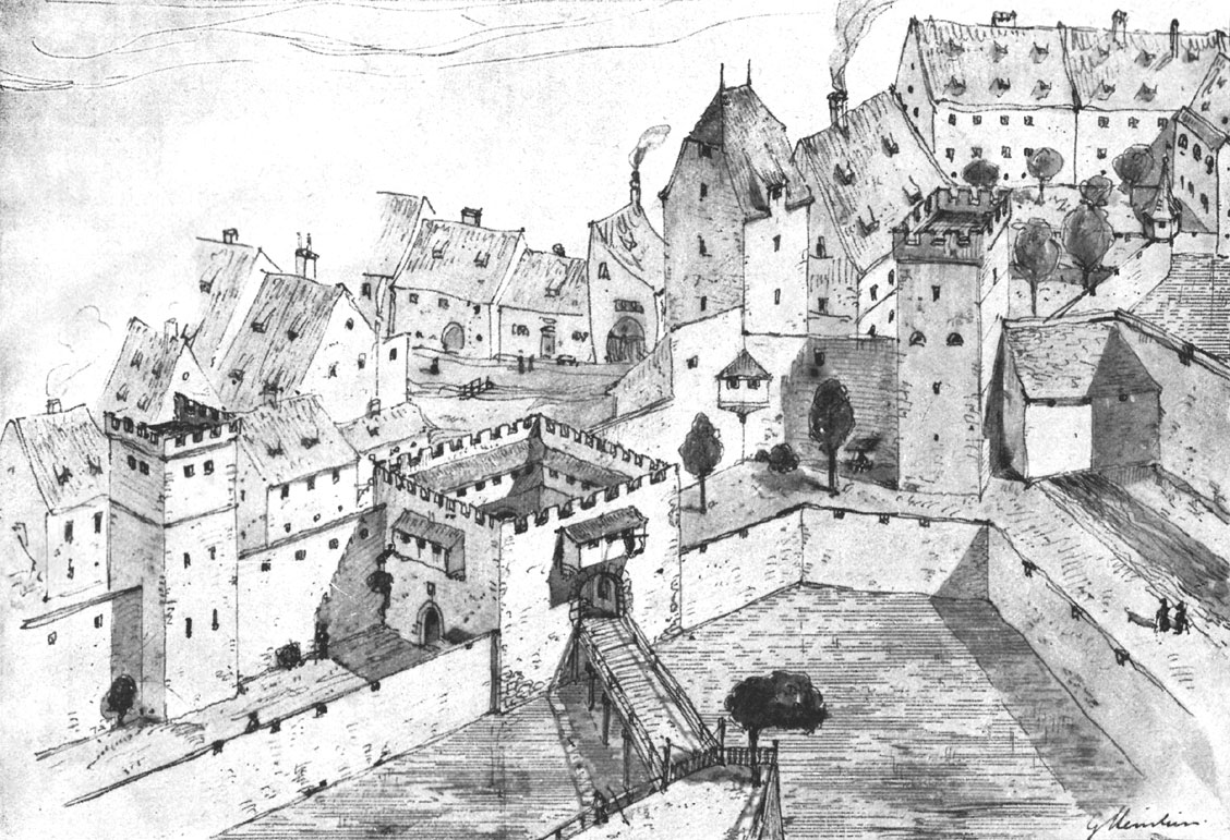 Abb. 32. Das Schiffertor am Rosental (Außenseite)